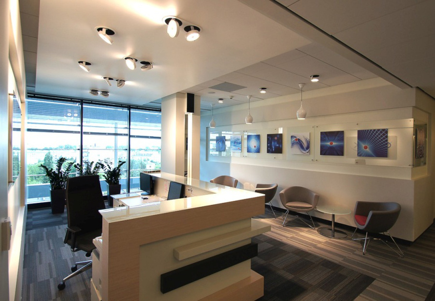 Biuro firmy Qumak w Warszawie